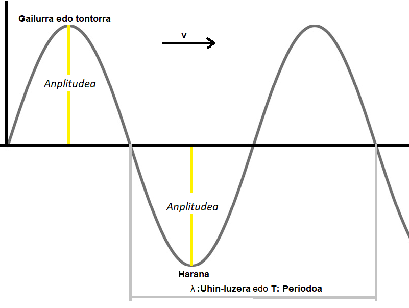 Irudi honetan uhin sinusoidal baten anplitudea, gailurra eta harana ikus daitezke.